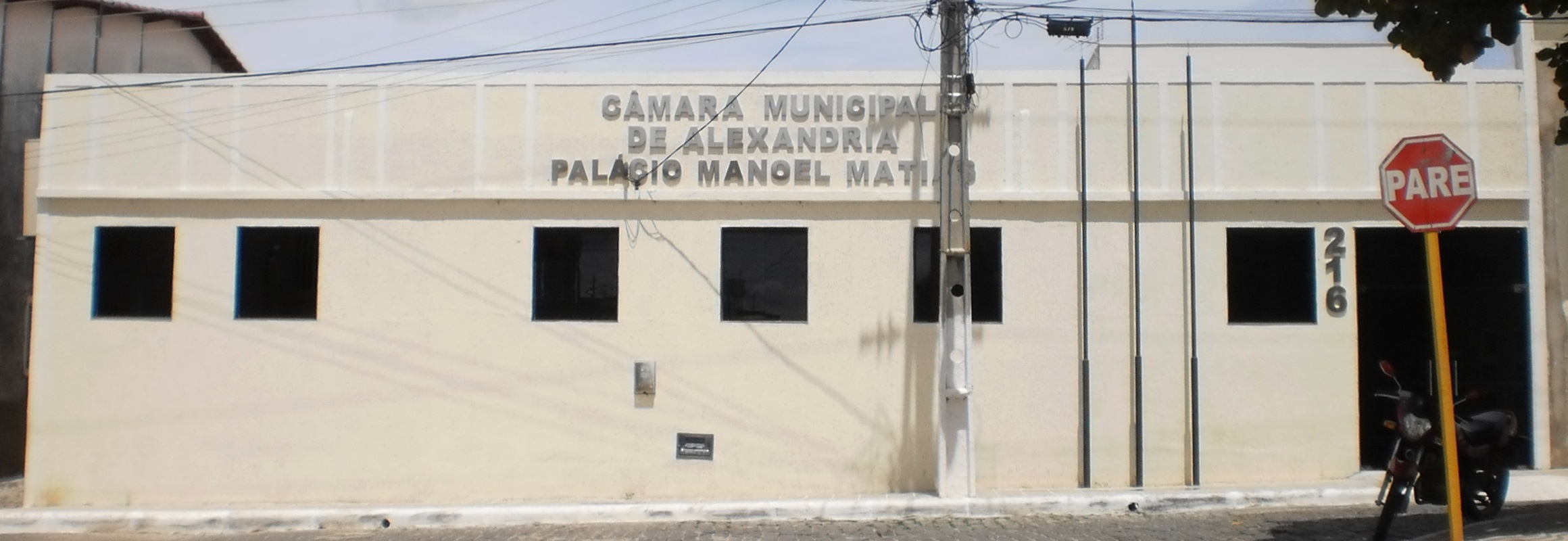 Palácio Manoel Matias, sede do poder executivo municipal de Alexandria - Rio Grande do Norte, Brasil.